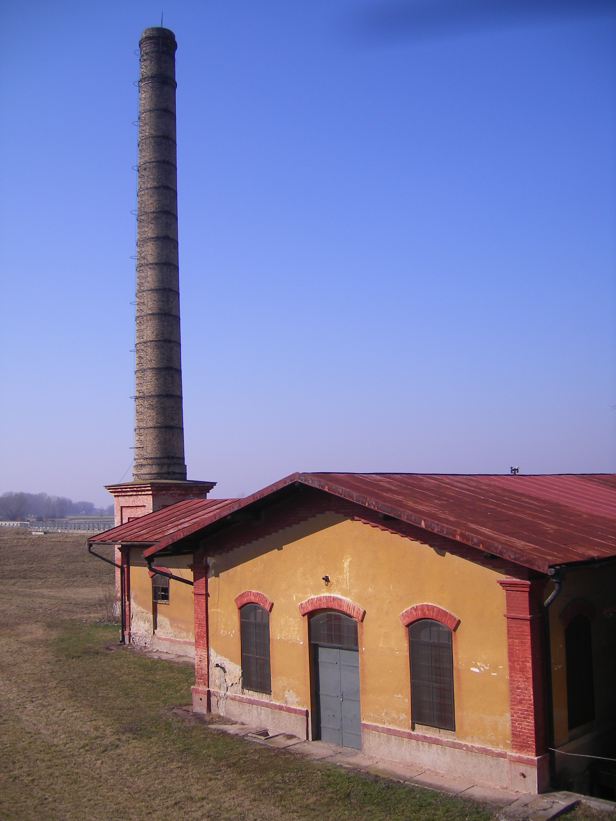 Pat - régi szivattyúállomás a Zsitva mellett